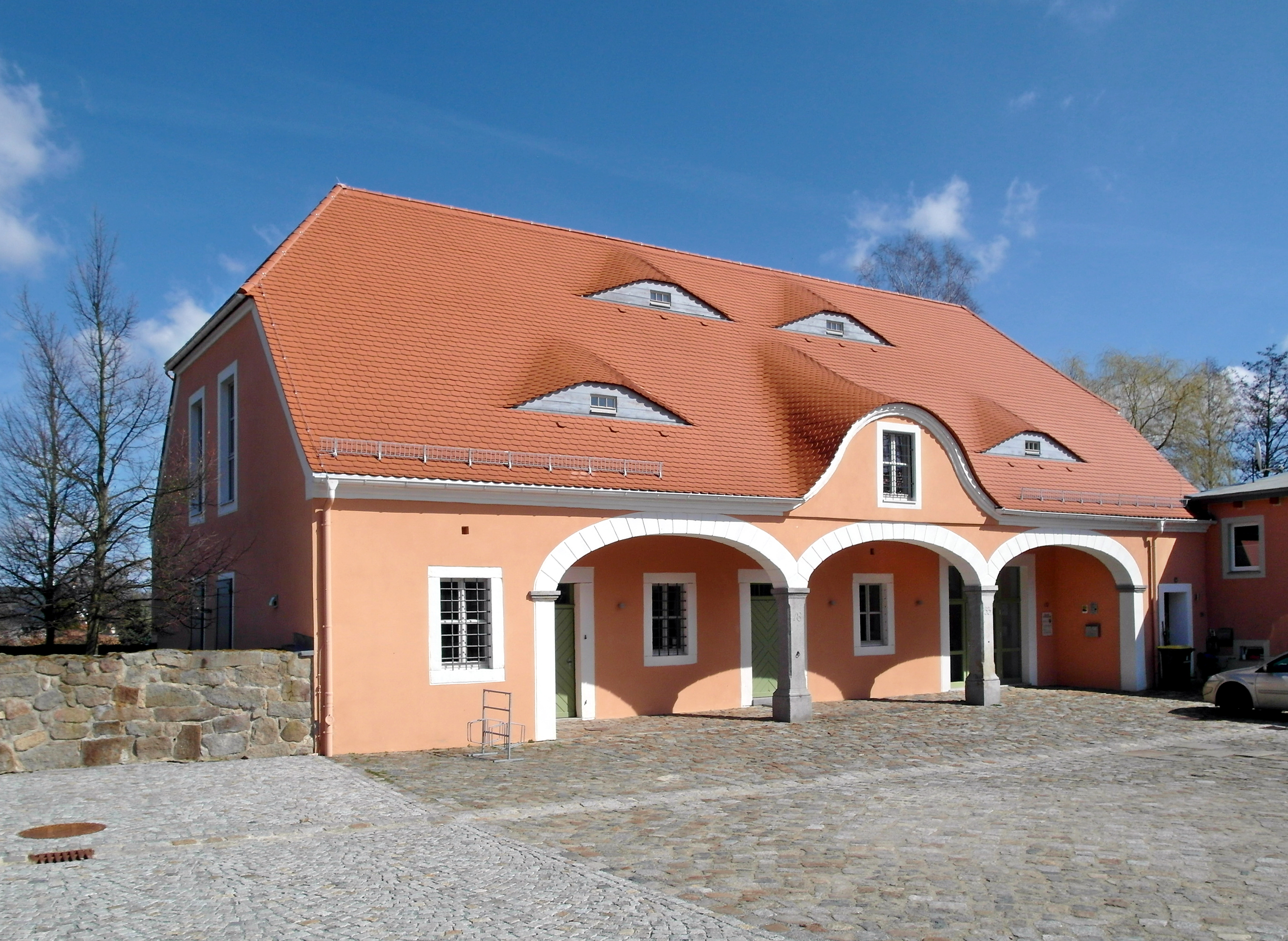 26.03.2017 02708 Dürrhennersdorf, Hauptstraße 60: Rittergut, ehem. Pferdestall (1853) mit in Bögen zum Hof geöffneter Kumthalle. [SAM8606.JPG]20170326080DR.JPG(c)Blobelt